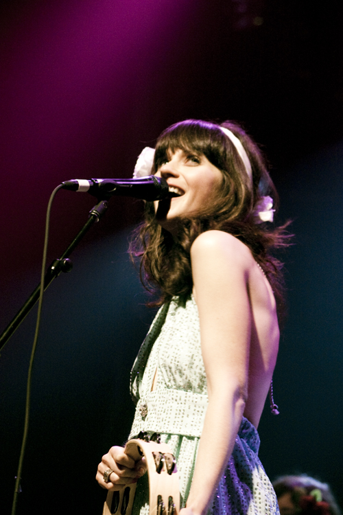 Terminal 5, NYC